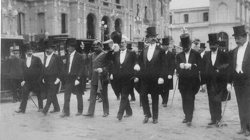 El gobernador de Tucumán, Ernesto Padilla junto al Ministro de Instrucción Pública de la Nación, Joaquín V. González, acompañado por otras personalidades, entre ellas, el futuro gobernador de Tucumán, Miguel Campero, como presidente de la Corte Suprema de Justicia de la Provincia (extremo izquierdo), se dirigen a los actos de fundación de la Universidad Nacional de Tucumán.